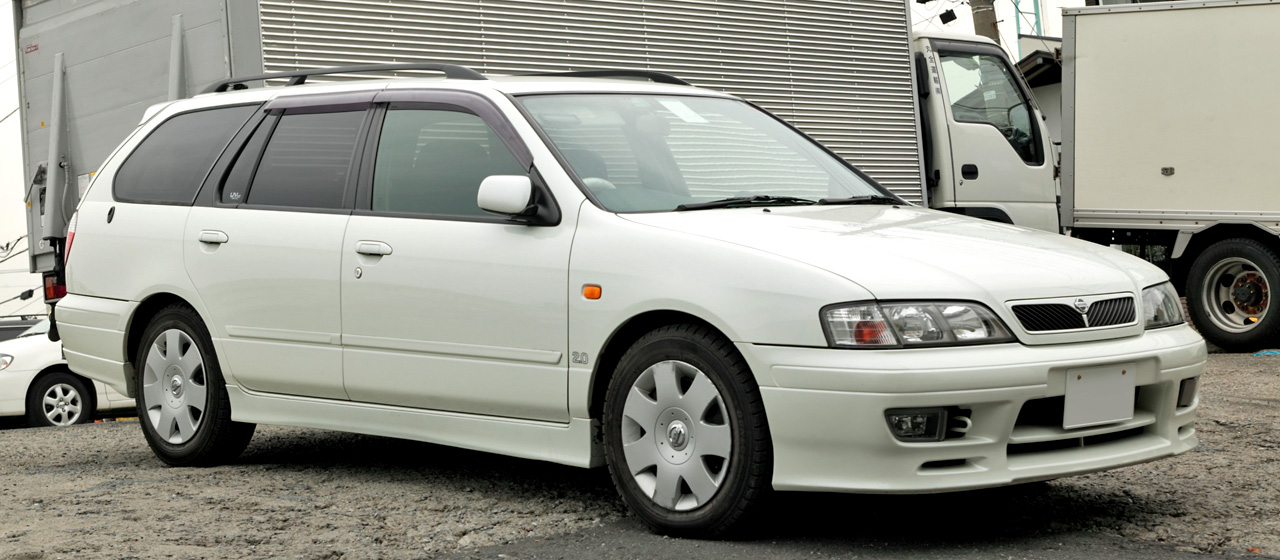 Nissan Primera Camino Wagon